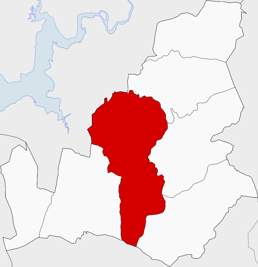 Extensión de la parroquia de Lousame en Lousame